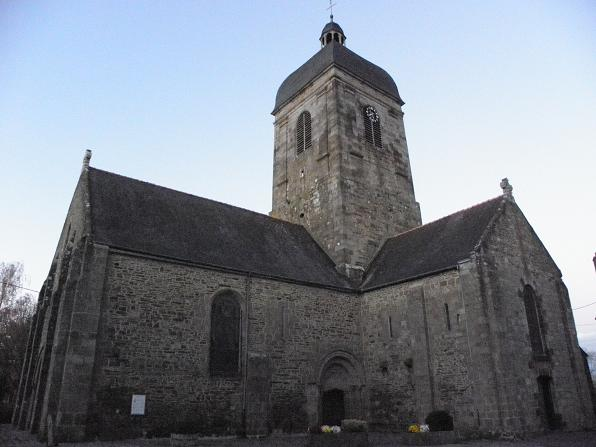 Eglise St-André d'Antrain (35)